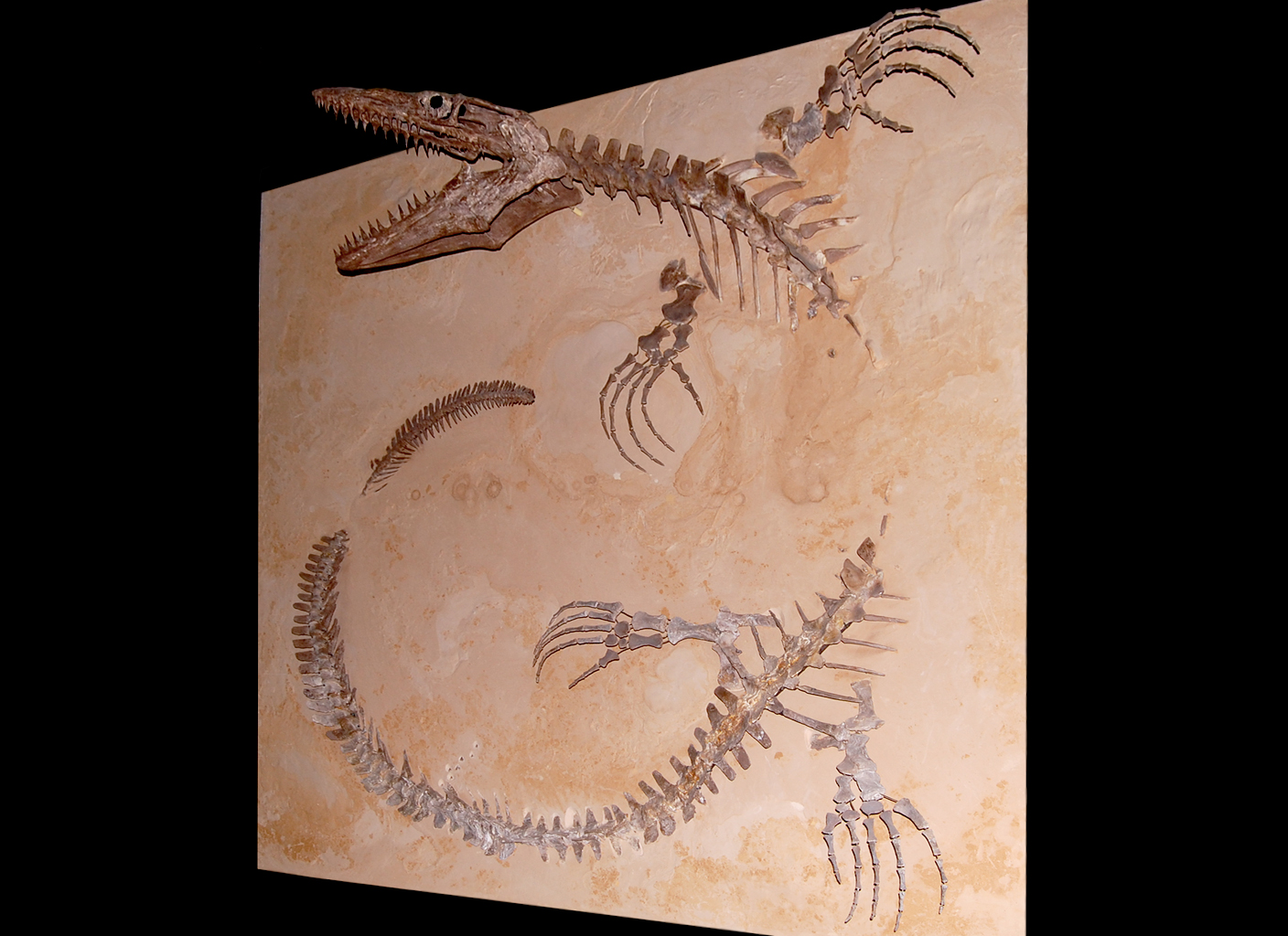 Naturhistorisches Museum Wien